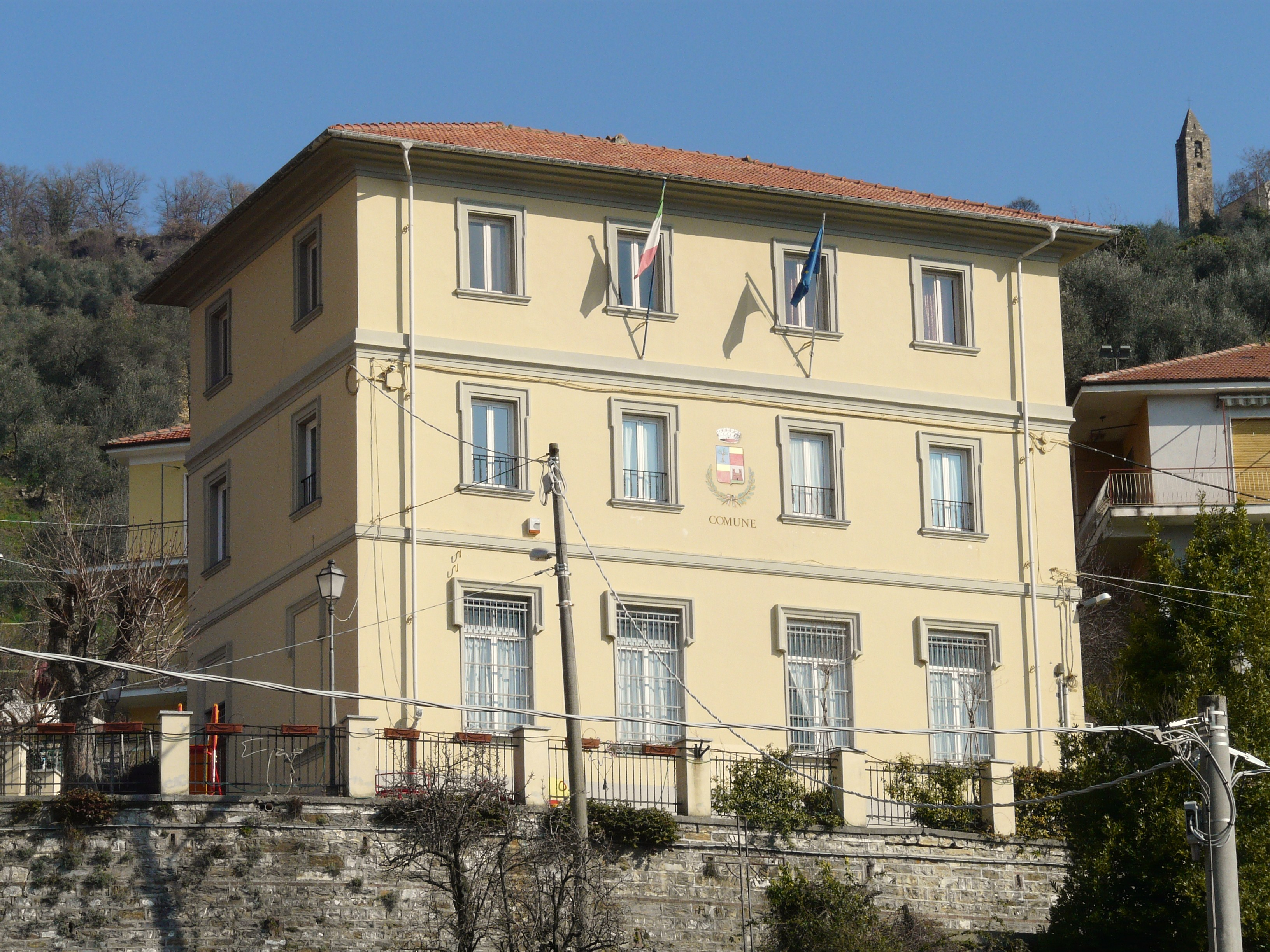 Municipio di Aurigo, Liguria, Italia